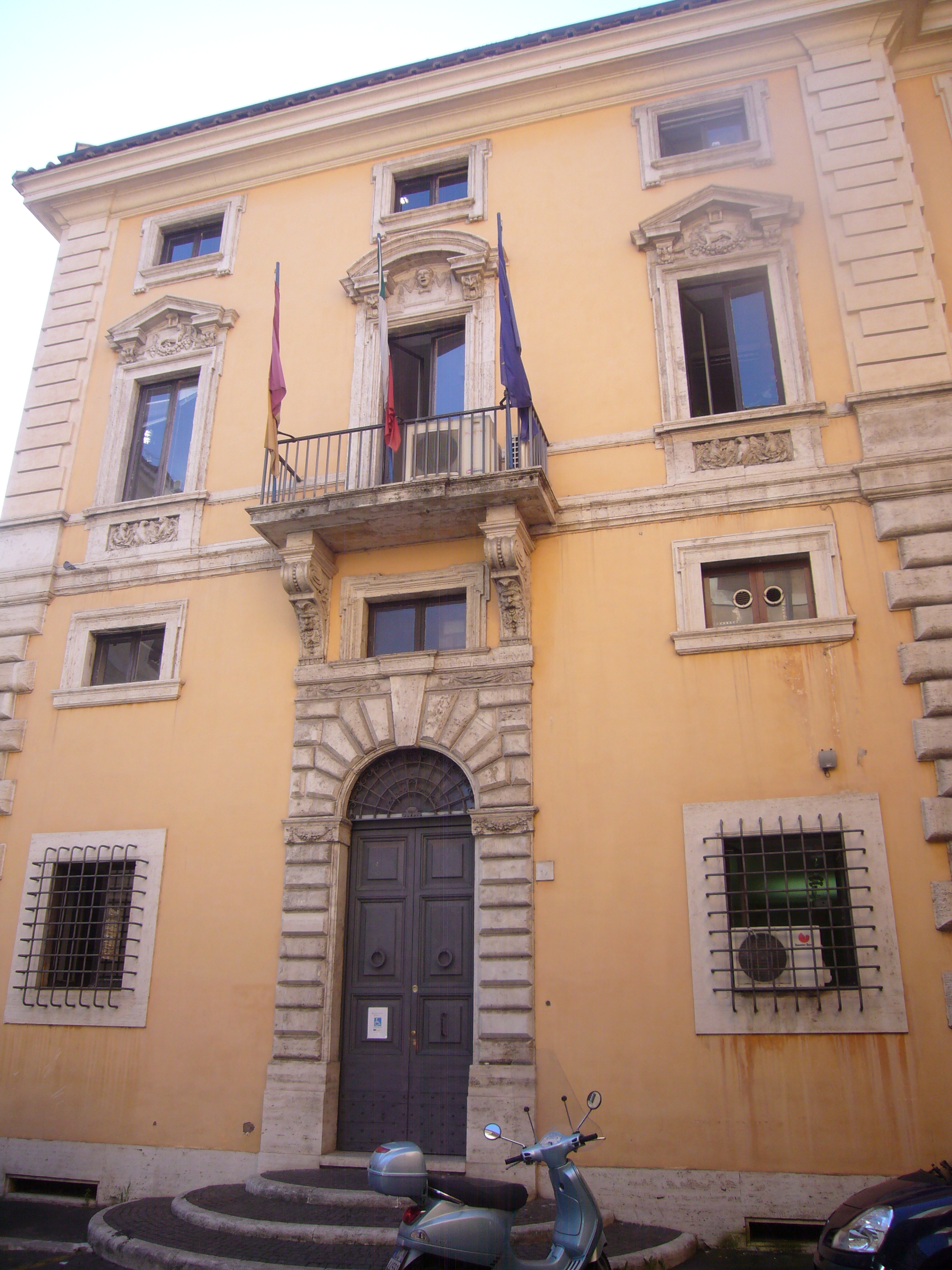 Roma, facciata della casa di Flaminio Ponzio ricostruita a piazza Campitelli.